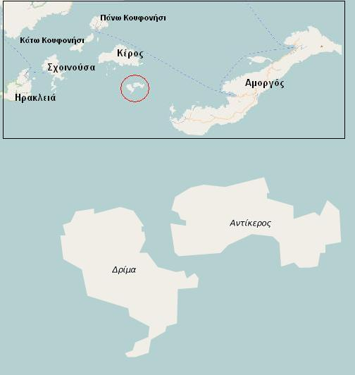 Άνω Αντικέρι (ή Αντίκερος) Αμοροργού